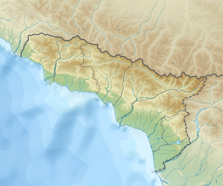 Физическая карта Абхазии.